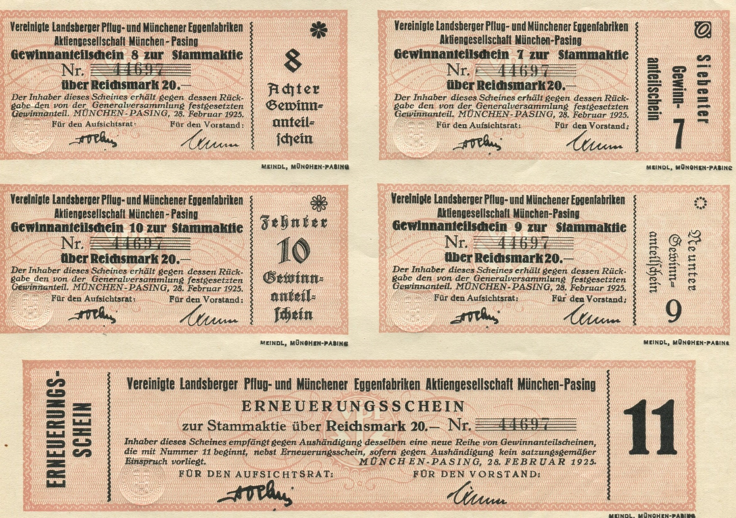 Aktien-Kupons der „Vereinigten Landsberger Pflug-und Münchner Eggenfabriken Aktiengesellschaft München-Pasing“ von 1925